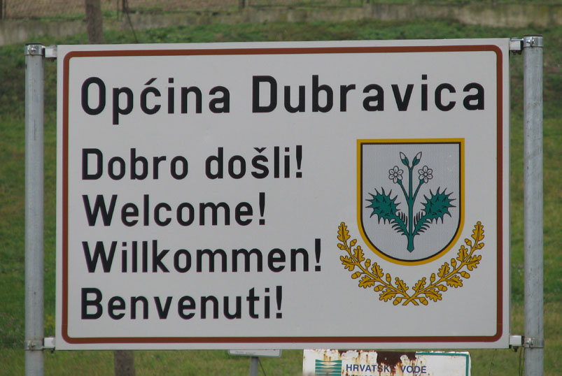 Natpisna ploča na ulazu u Općinu Dubravica, Zagrebačka županija, s grbom Općine